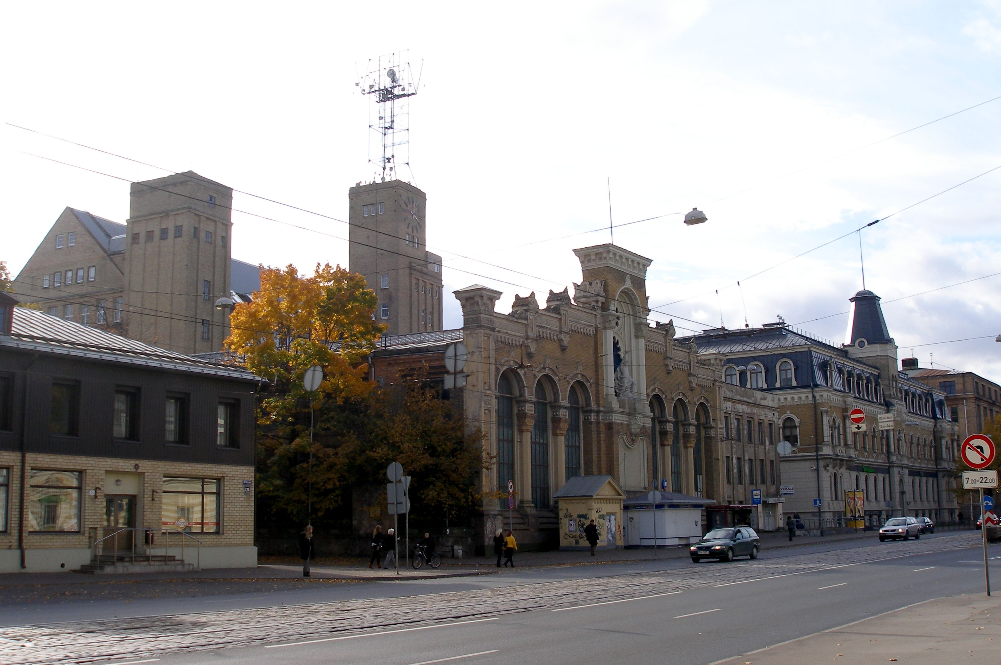 VEF vecākie korpusi. Fotografējis Jānis Vilniņš (scAvenger) 2008. gada 12. oktobrī.